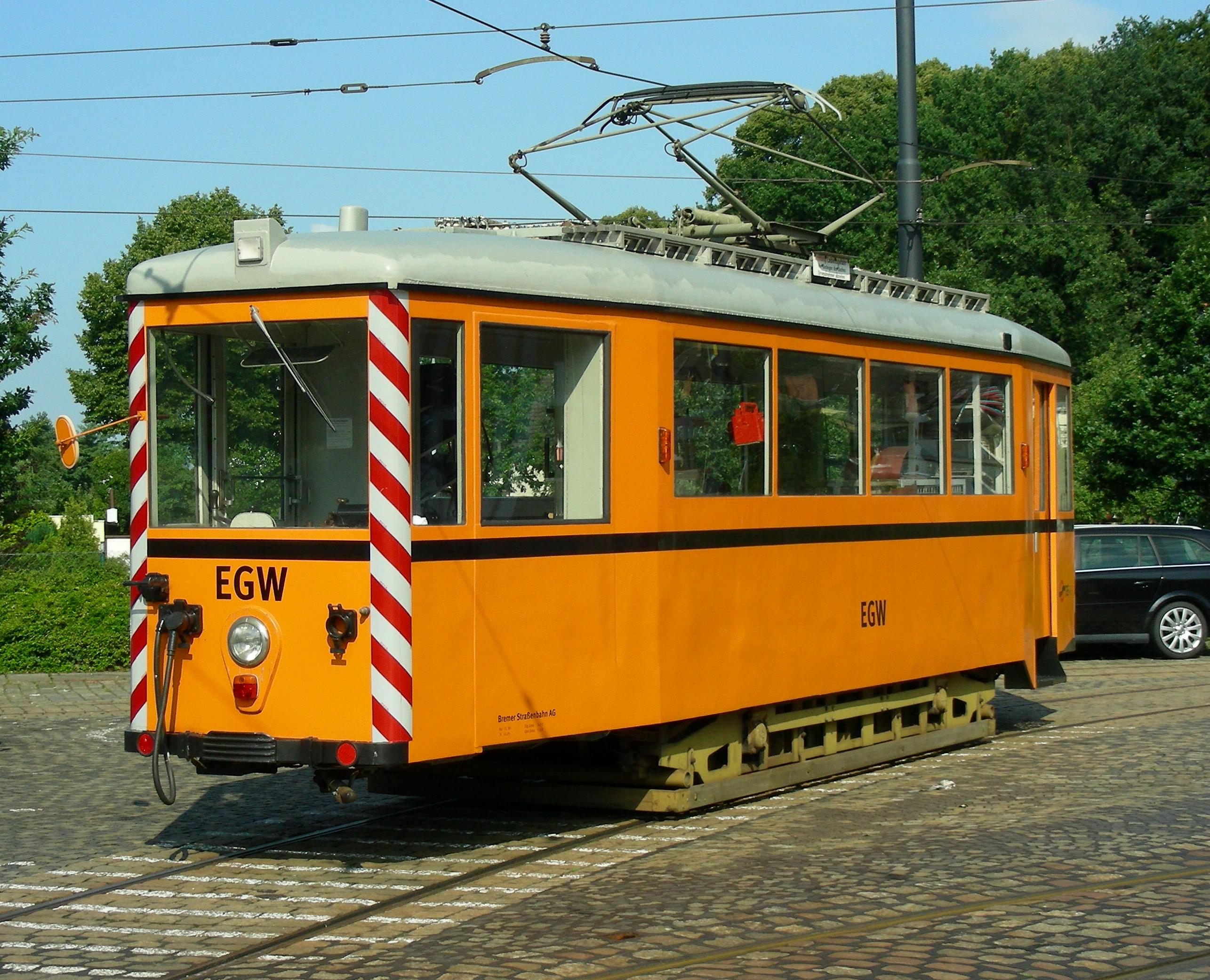 Eingleisgerätewagen der Bremer Straßenbahn AG Service Car for derailment incidents of Bremer Straßenbahn AG